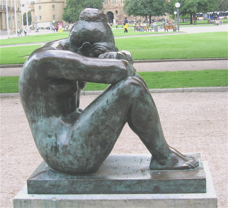 Aristide Maillol: la_nuit, 1902 Schlossplatz in Stuttgart (Öffentlicher Platz)